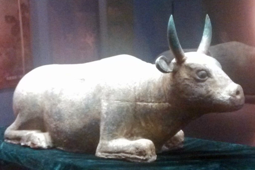 鎏金铜牛，1977年宁夏西夏陵区M177出土。